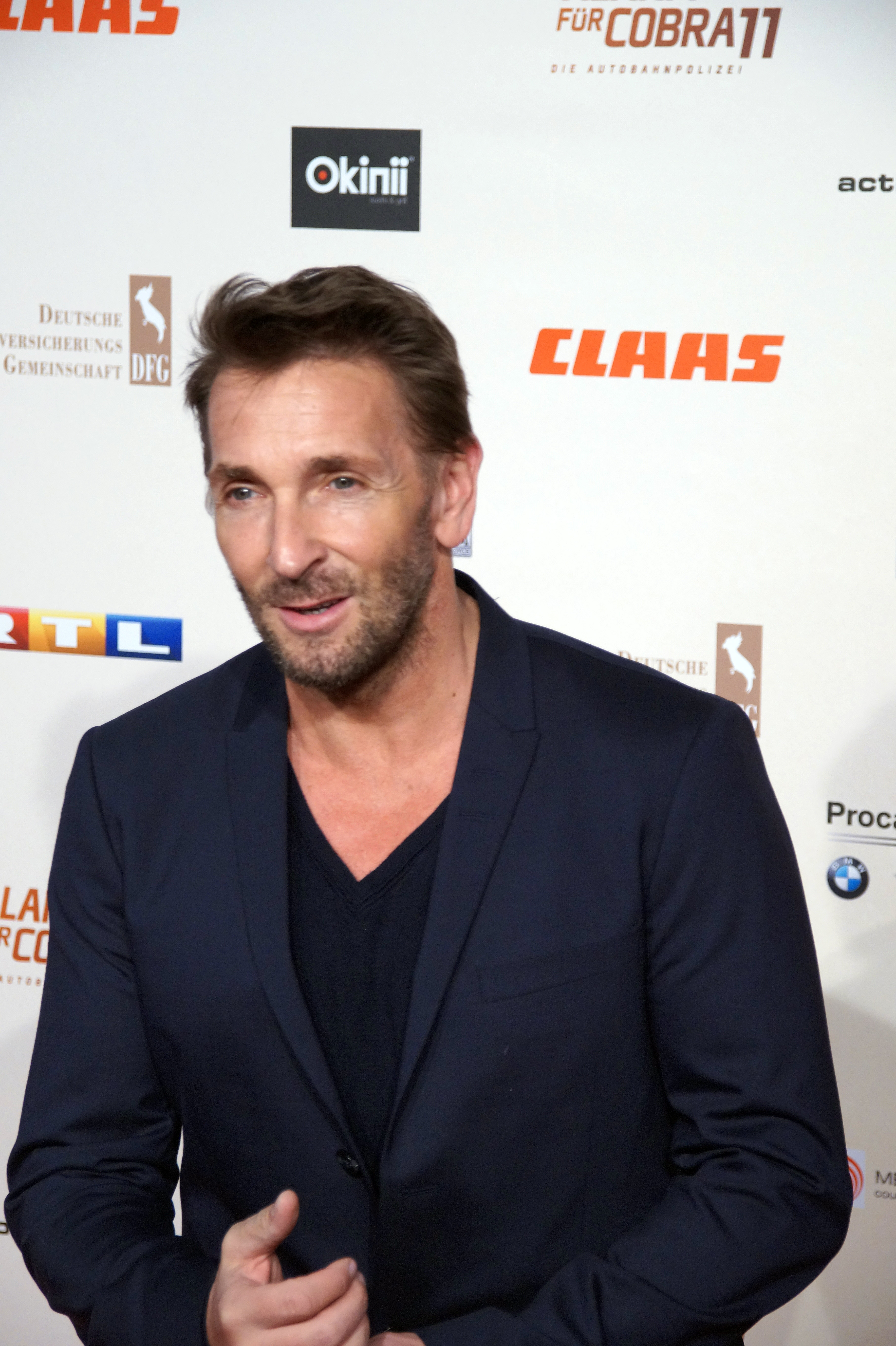 Mark Keller bei der Premiere von der 300. Folge 'Alarm für Cobra 11', April 2016.